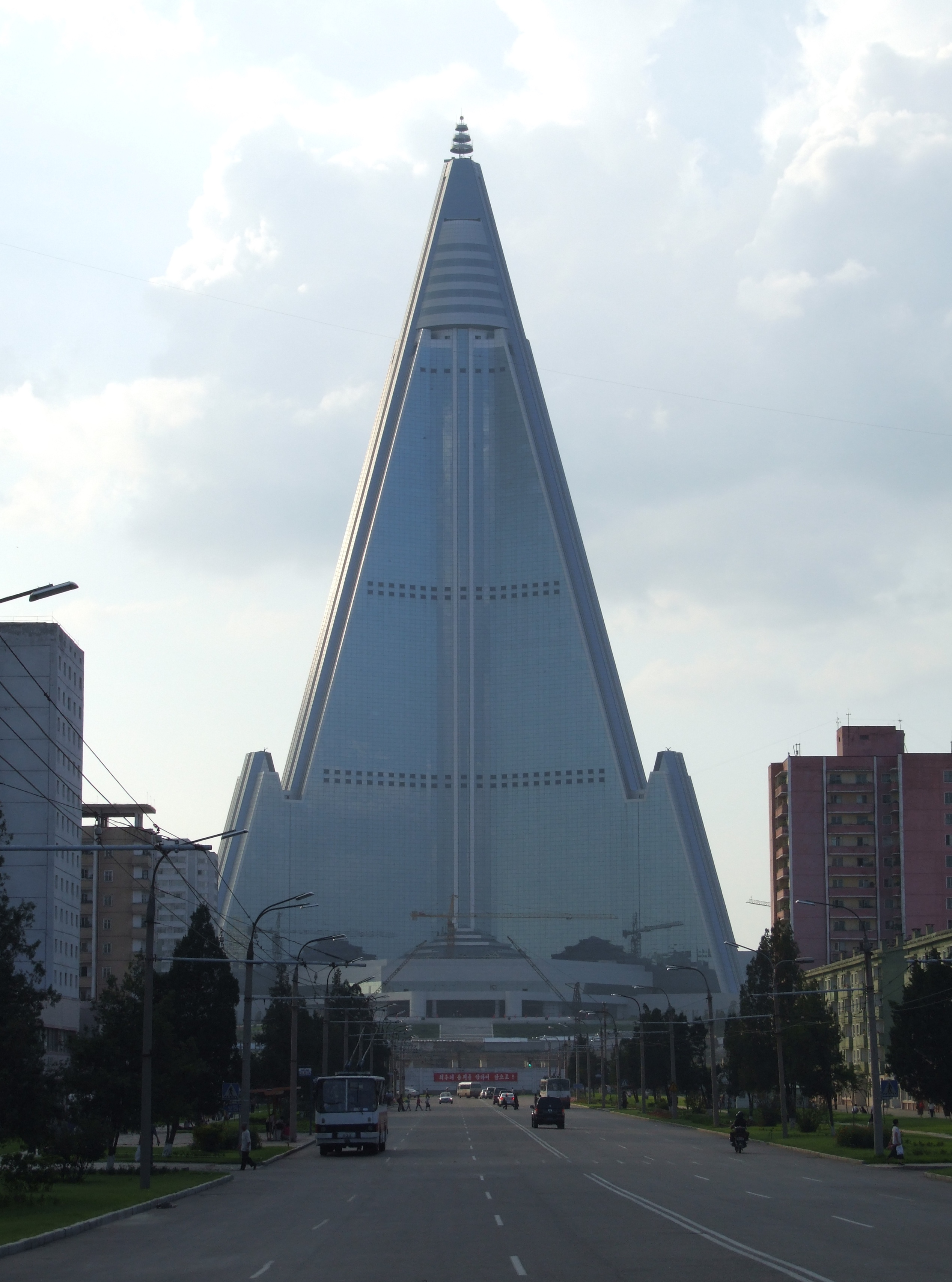 Ryugyong Hotel, August 2012.